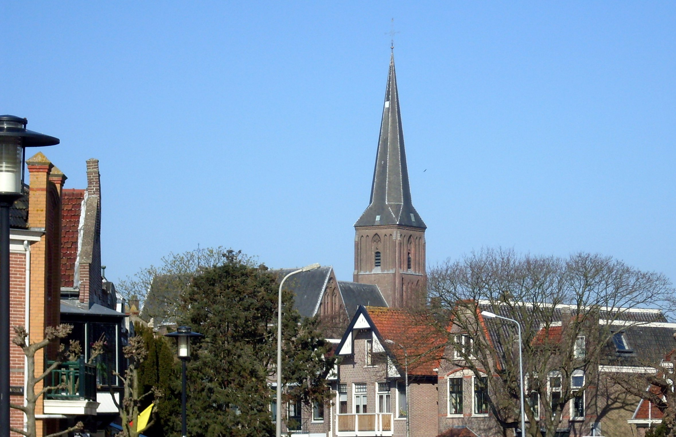 Zicht op de katholieke kerk